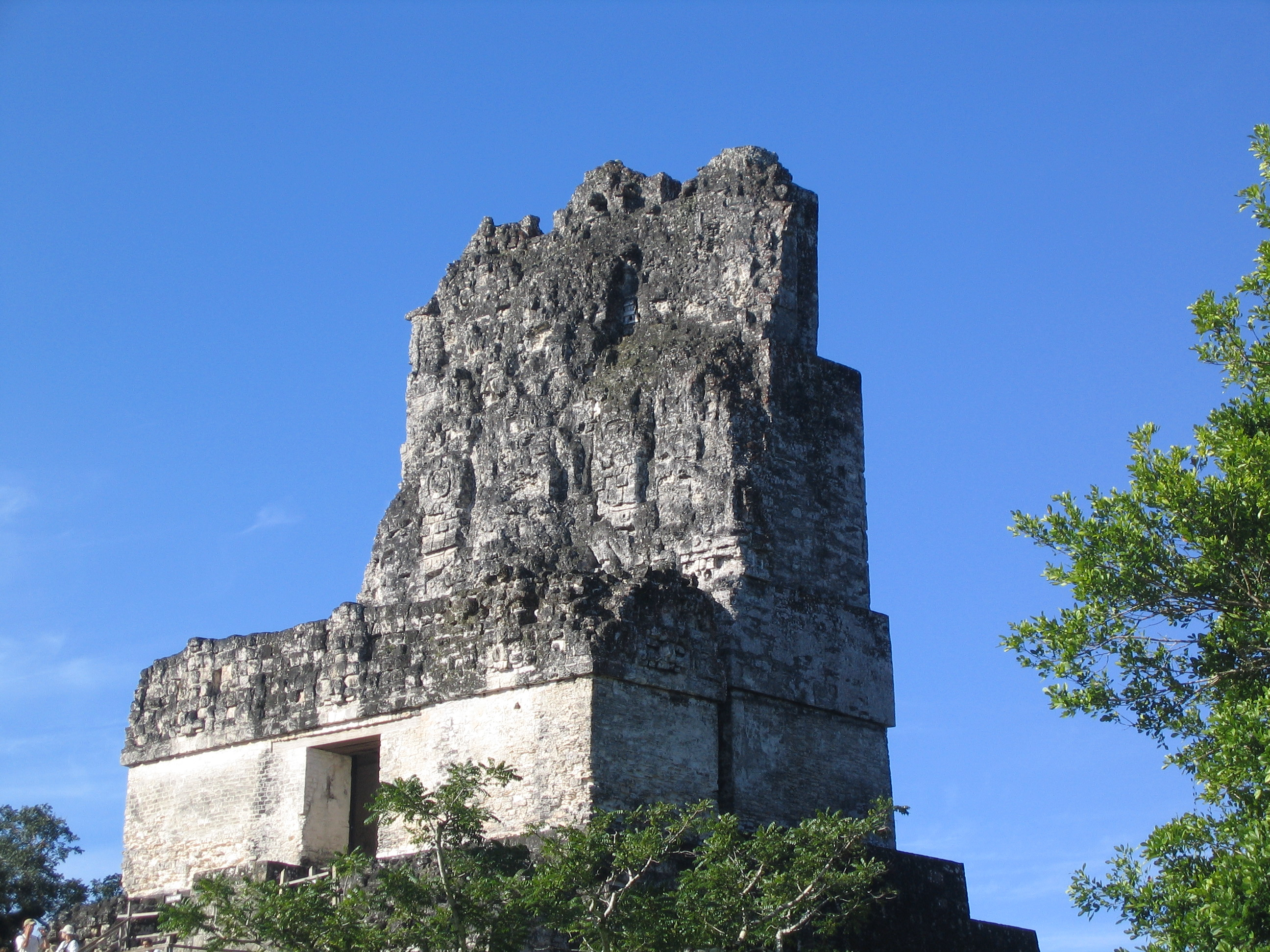 Tikal, Guatemala Own work Dez 2006